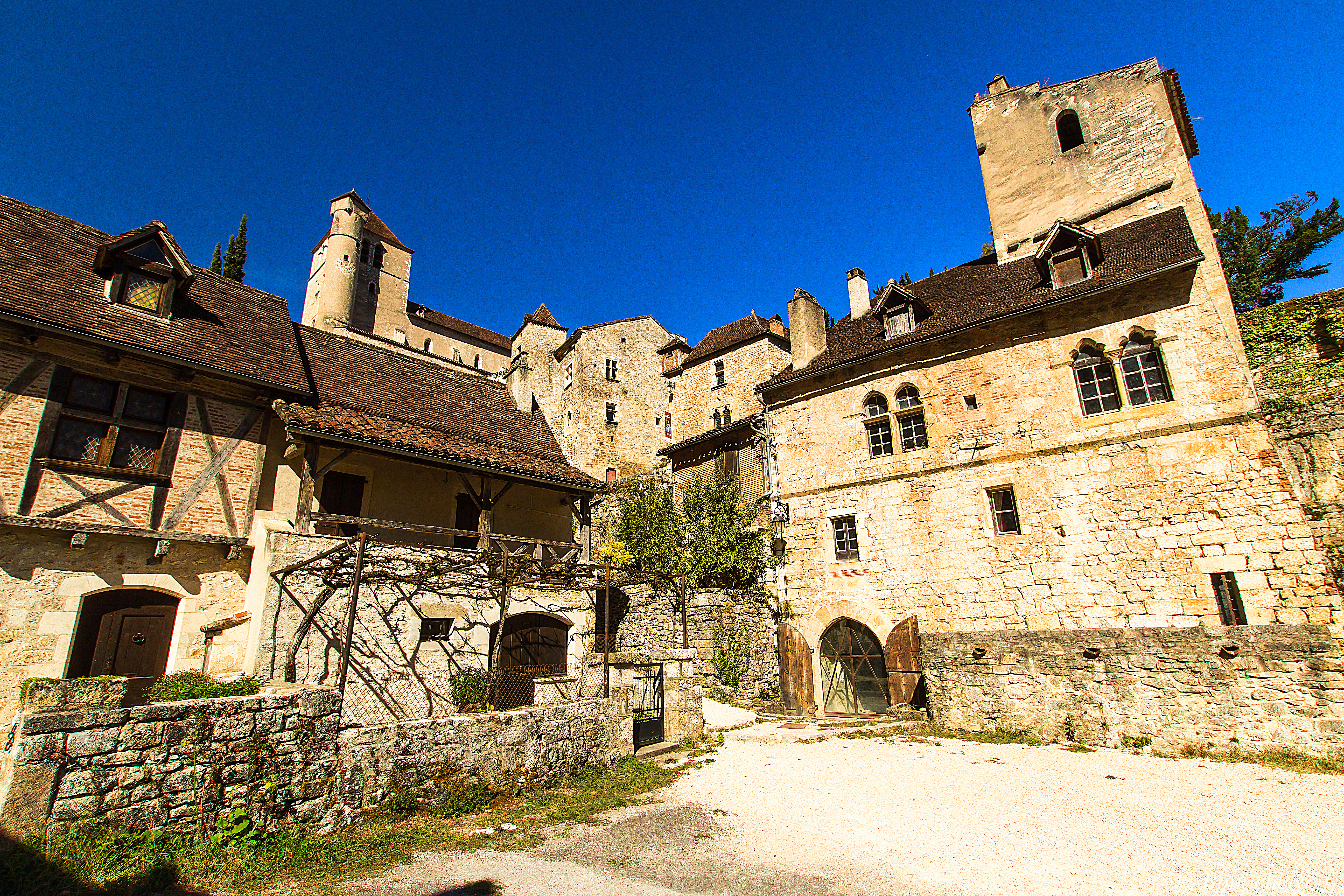 Dans les rues de St Cirq La Popie